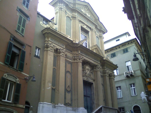 Antonello Piccone, Facciata della chiesa di Sant'Andrea a Savona (Italy)